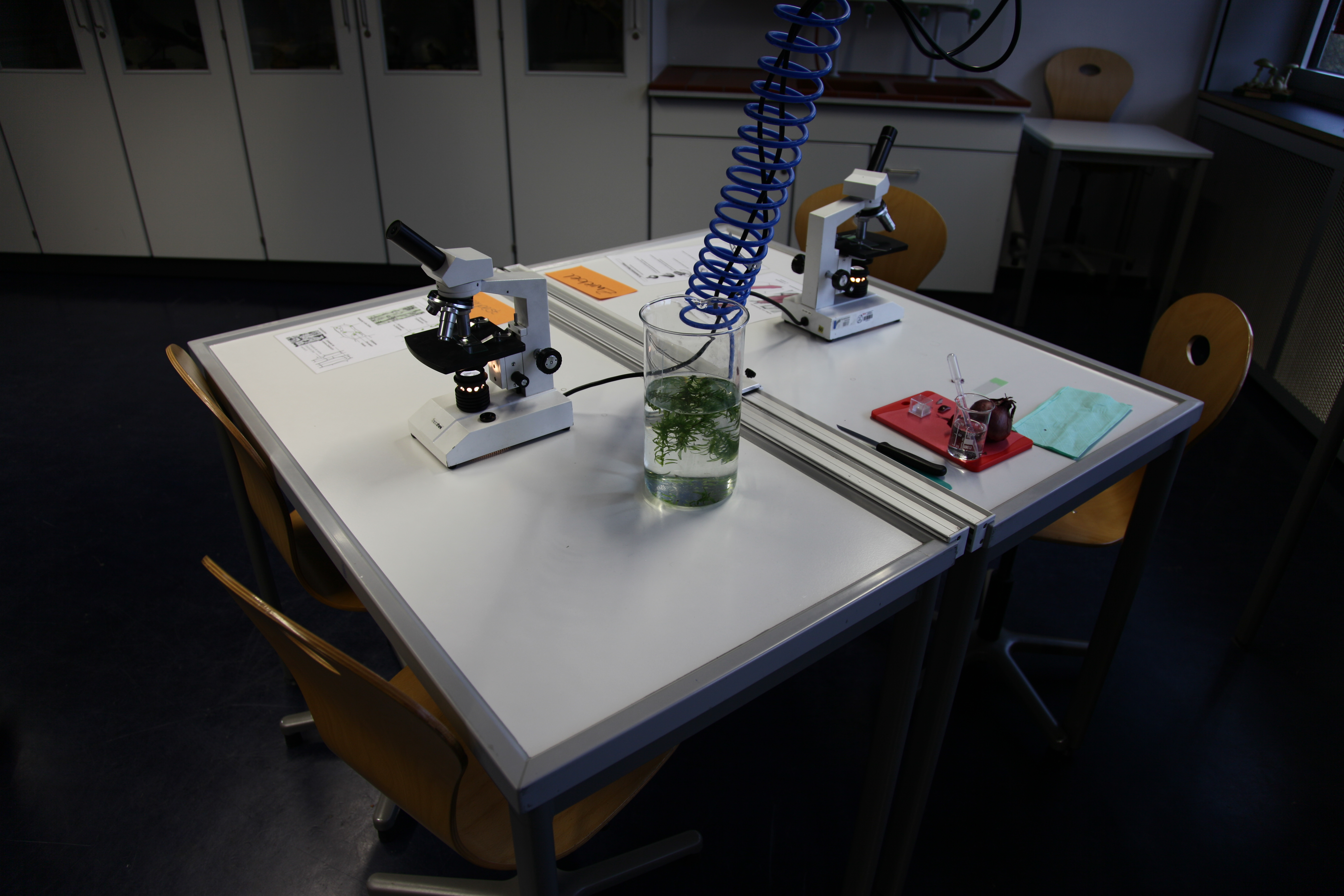 Biologieraum der Immanuel-Kant-Schule in Rüsselsheim am Main während des Tages der offenen Tür 2018